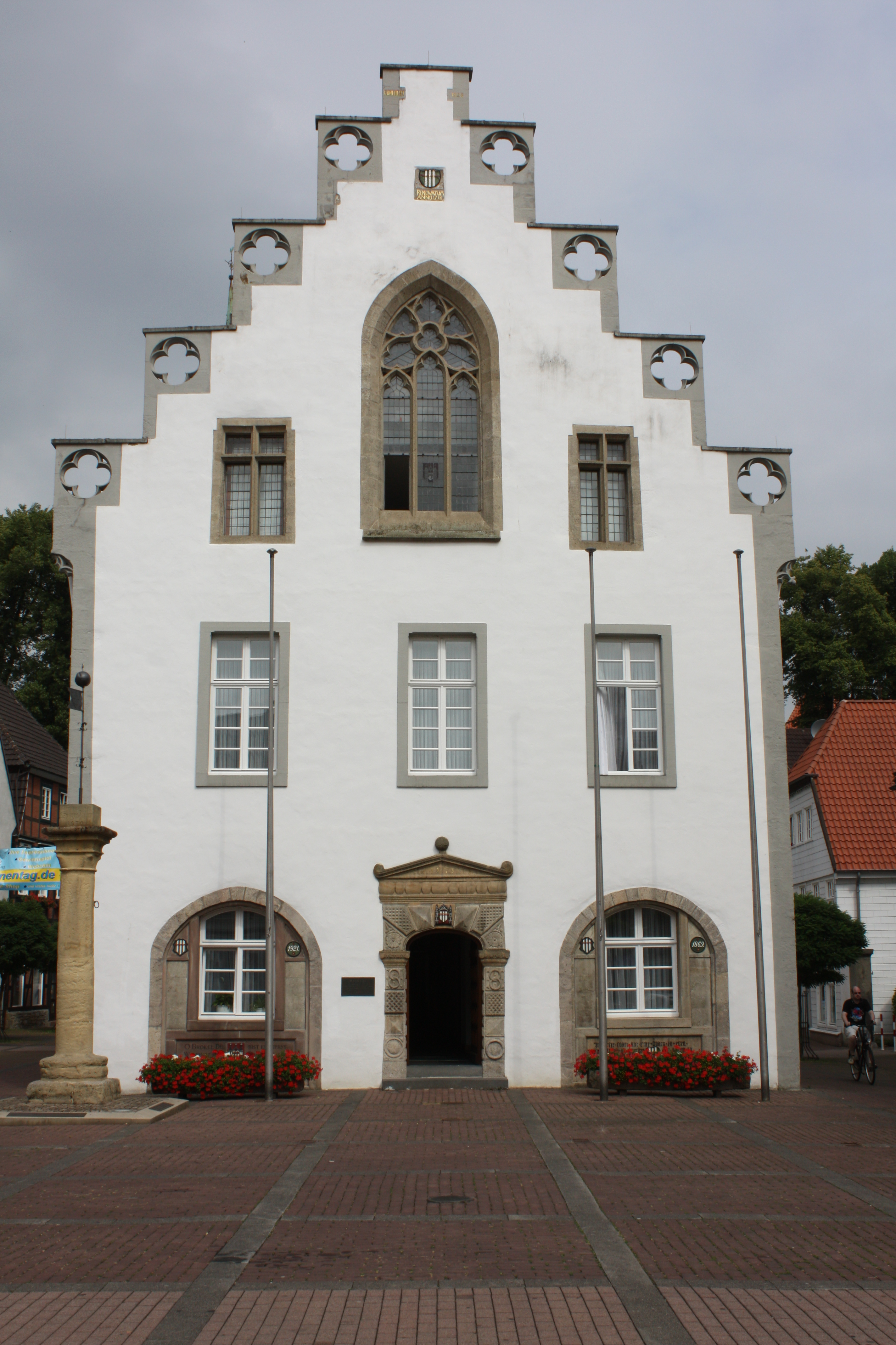 Rathaus Brakel, Kernbau des 13. Jahrhunderts, Gotische Treppengiebel des 14. Jahrhunderts, Ratskeller aus dem 16. Jahrhundert. Von 1340-1823 als Schänke genutzt. 1572 Portal in Weserrenaissance ergänzt.